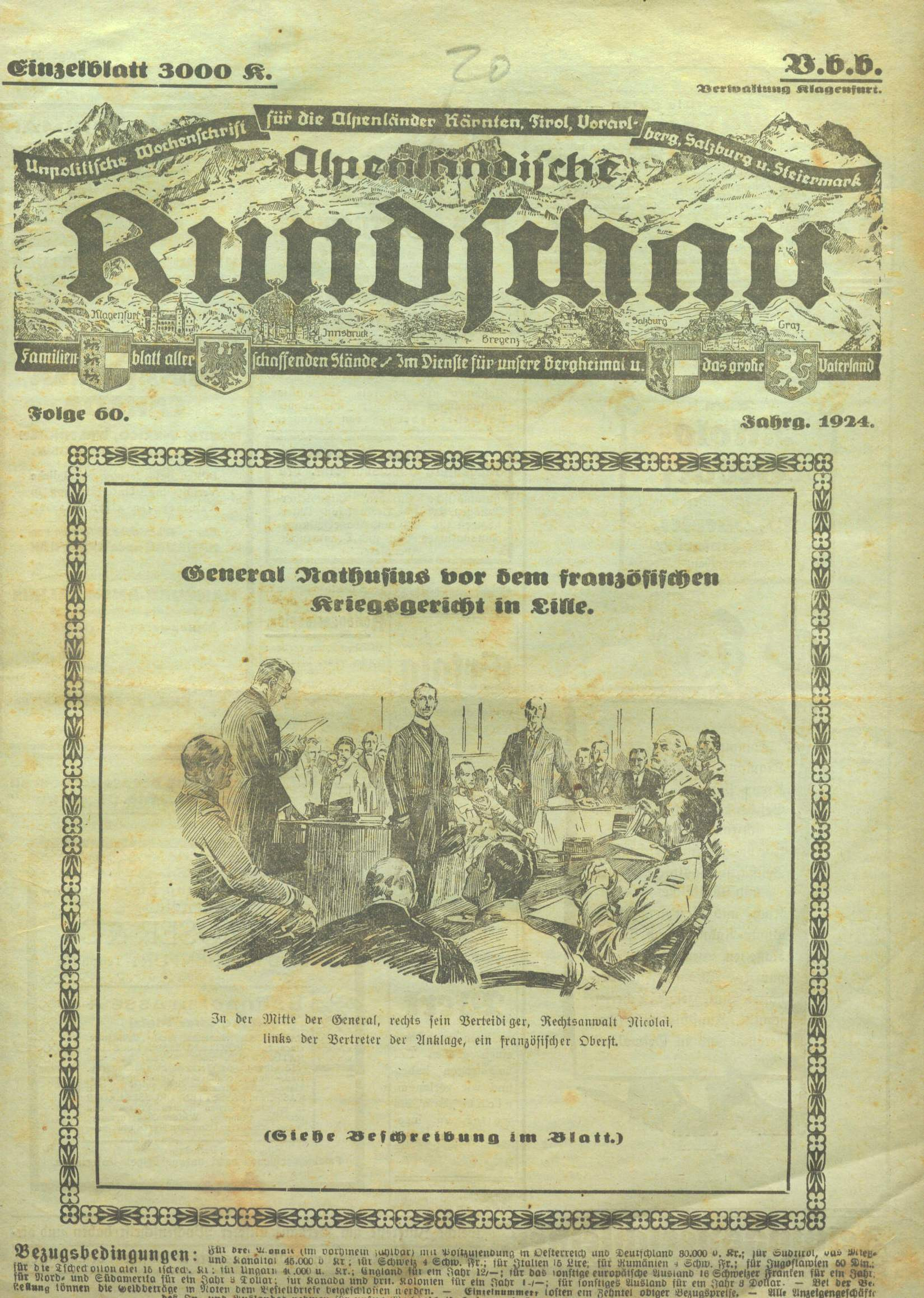 Zeichnung zum Gerichtsprozess gegen Generalmajor a.D. Wilhelm von Nathusius im November 1924 in Lille, Frankreich. Erschienen auf der Titelseite: Alpenländische Rundschau, Untertitel: Unpolitische Wochenschrift für die Alpenländer Kärnten, Tirol, Vorarlberg, Salzburg und Steiermark; Folge 60, Jahrg. 1924; Verlag gem. Impressum und Abonnementbestellkarte: Verlagsanstalt “Alpenländische Rundschau” und Rotationsdruck Gutenberghaus, Klagenfurt; Wilhelm Merkel (Hrsg.); Hans Kerschbaum (Schriftleitung). Verlag und Zeitung wurden vor dem Zweiten Weltkrieg von dem NS-Gauverlag übernommen; die Zeitung wurde nach dem Krieg nicht mehr verlegt.